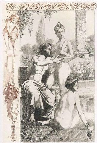 Dessins de Martin van Maële. Illustration du Thais d'Anatole France. 1901.